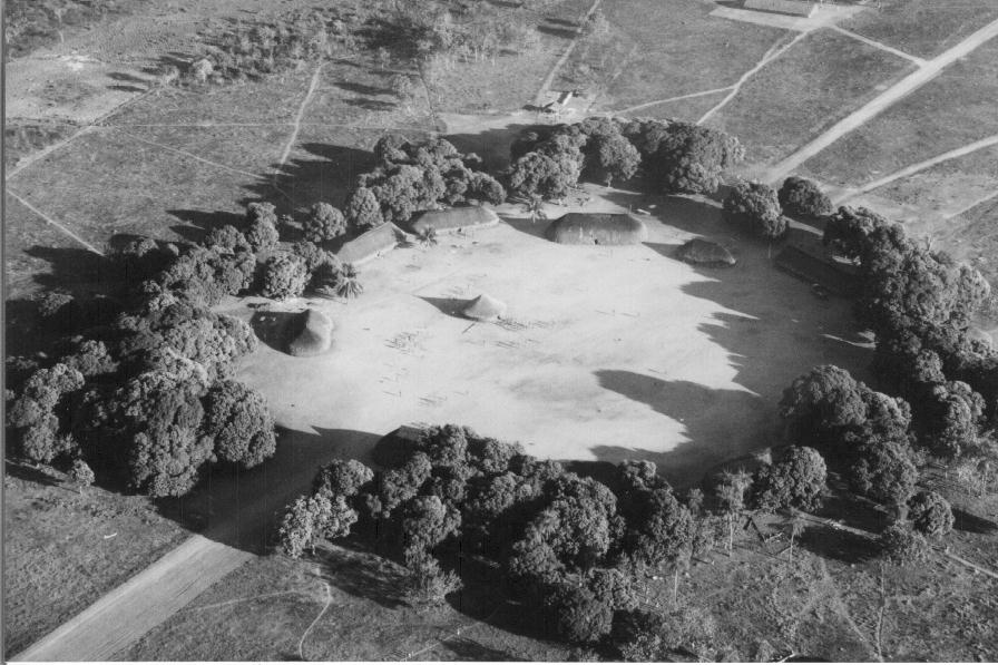 Aldeia Kamaiurá - Alto Xingu autor: Noel Villas Bôas